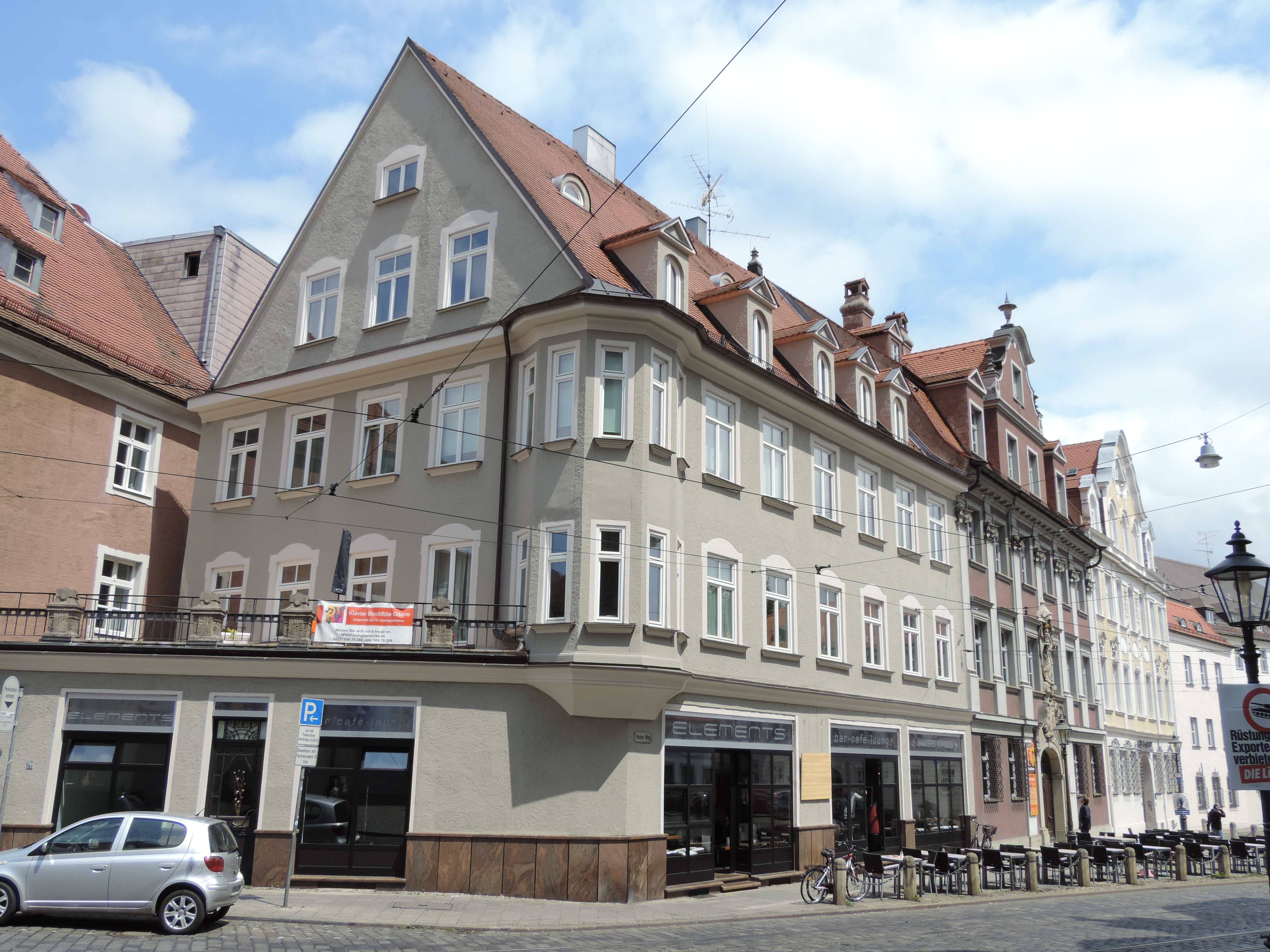 Ehemaliger Domherrenhof